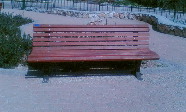 ספסל רחוב. צילם דוד שי